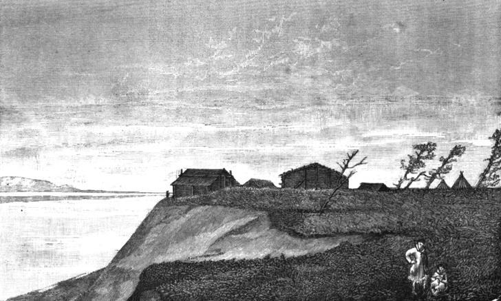 Юрты князя Тайшина